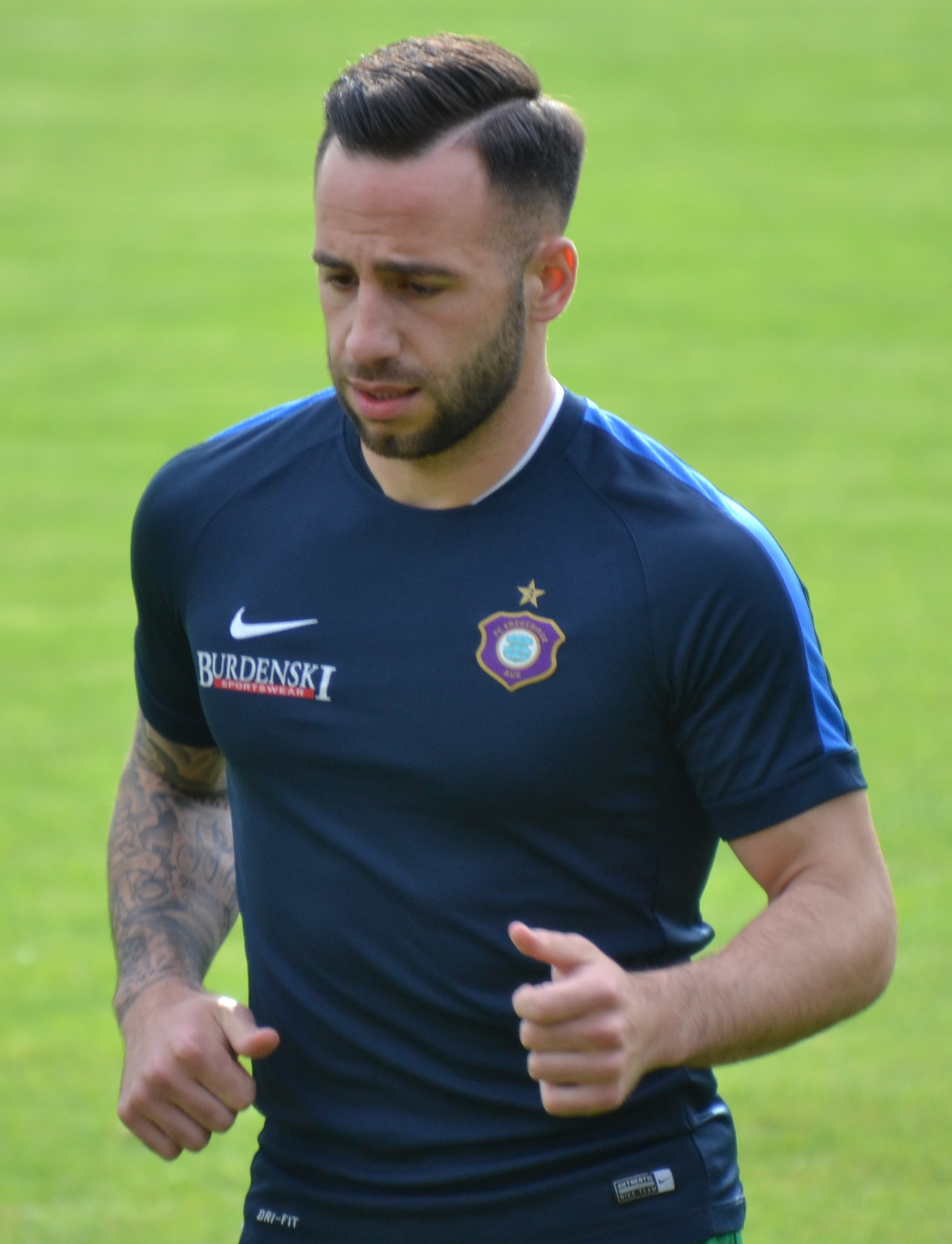 Calogero Rizzuto beim Aufwärmen vor dem Freundschaftsspiel von Erzgebirge Aue gegen den HFC Colditz im Juni 2016